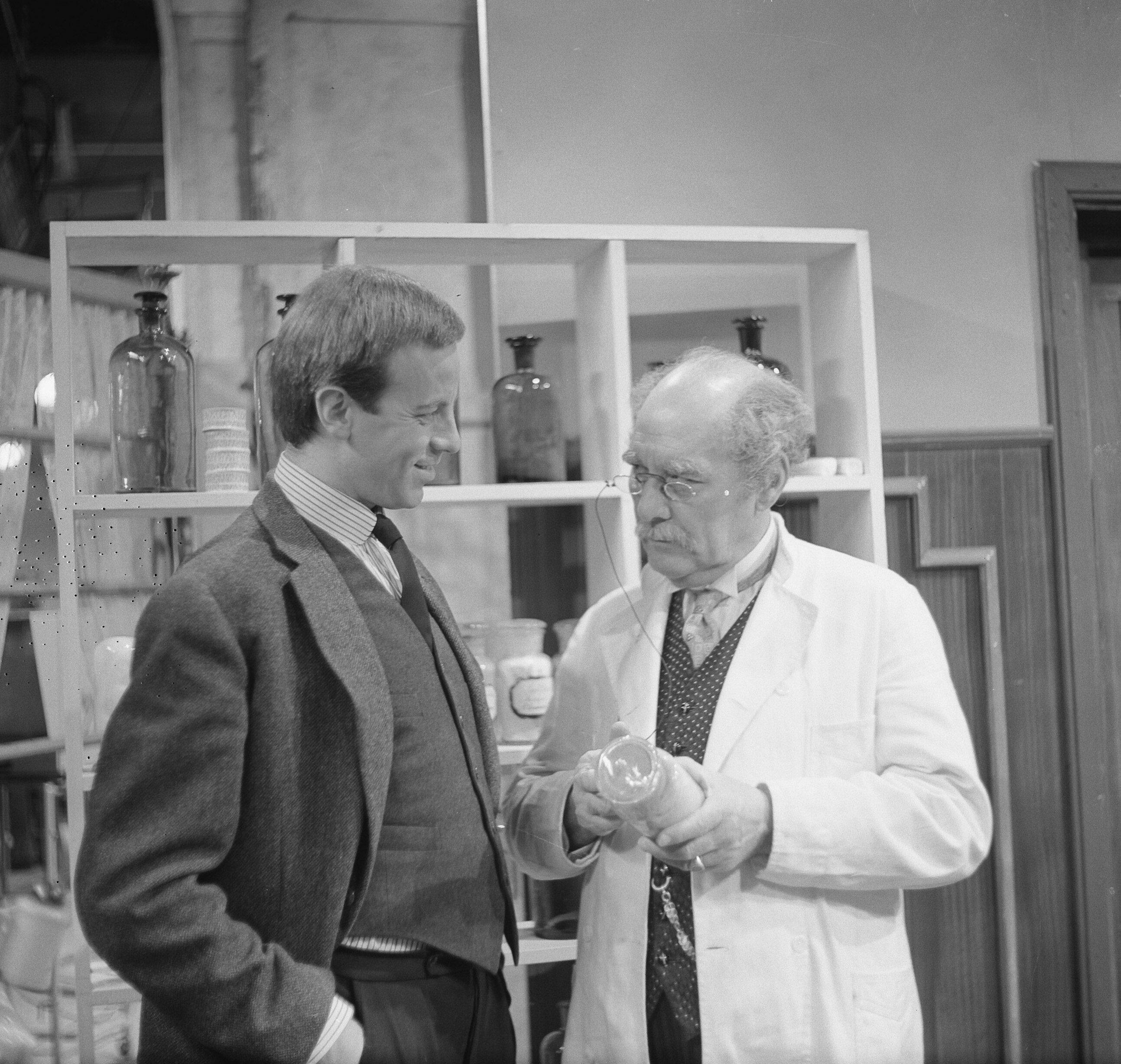 Collectie / Archief : Fotocollectie Anefo Reportage / Serie : [ onbekend ] Beschrijving : Televisiespel "Memorandum van een dokter", [uitzending 27-10-1963], rechts Rob Geraerds (als oudere chirurg), links Bram van der Vlugt Datum : 18 oktober 1963 Trefwoorden : acteurs, televisie, televisiespelen, toneel Persoonsnaam : Geraerds Rob, Vlugt, Bram van der Fotograaf : Nijs, Jac. de / Anefo Auteursrechthebbende : Nationaal Archief Materiaalsoort : Negatief (zwart/wit) Nummer archiefinventaris : bekijk toegang 2.24.01.03 Bestanddeelnummer : 915-6460